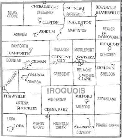 Iroquois County Illinois